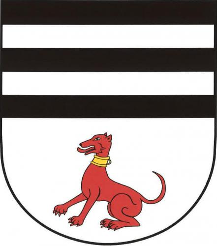 Polní Chrčice znak